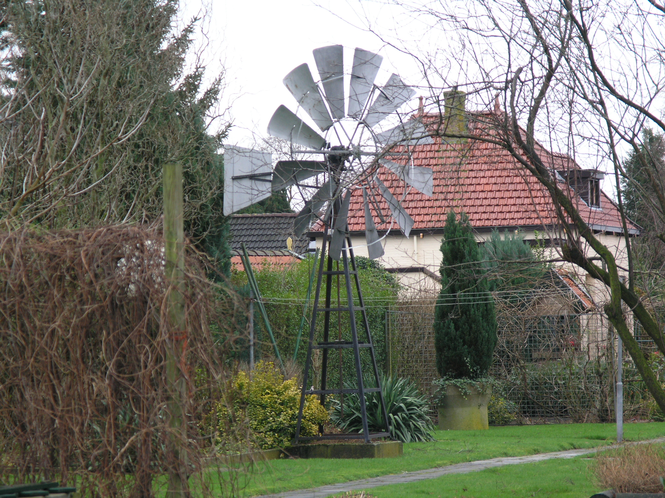 Oldeholtpade Kleine Windmotor